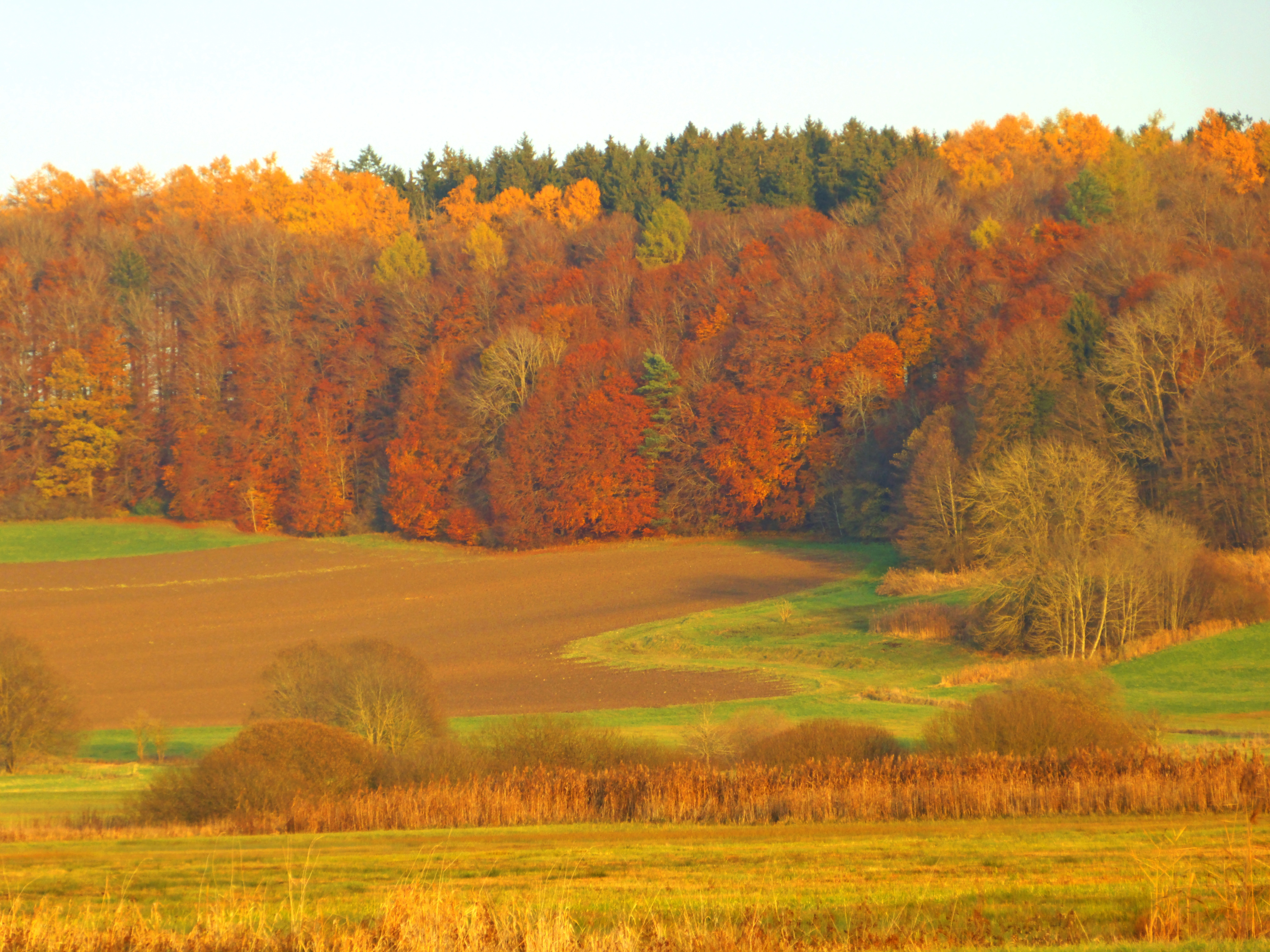 Heudorfer Ried